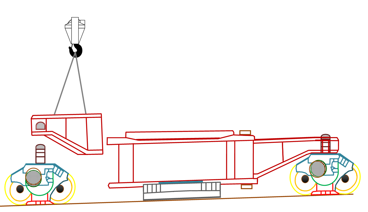 Сборка ходовой рамы КБМ-401 - часть 2